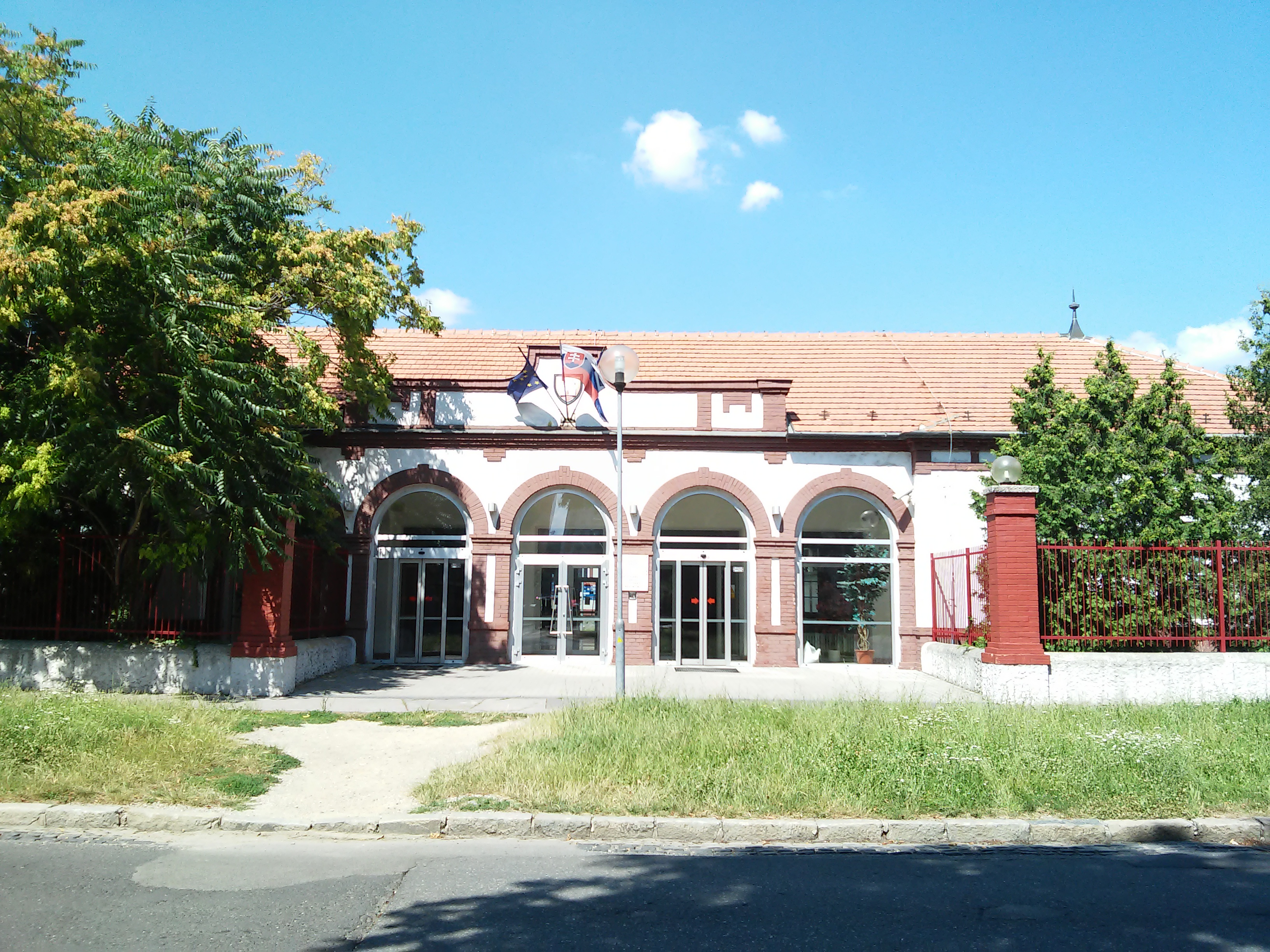 Kutuzovova, Nové Mesto, Bratislava